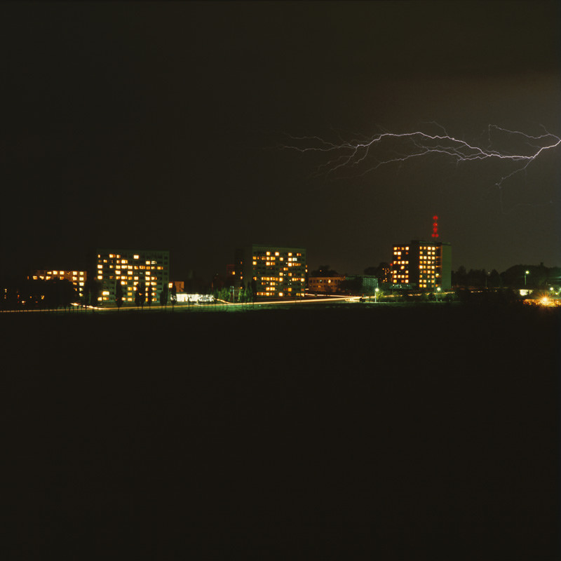 Chișinău at night in 1980